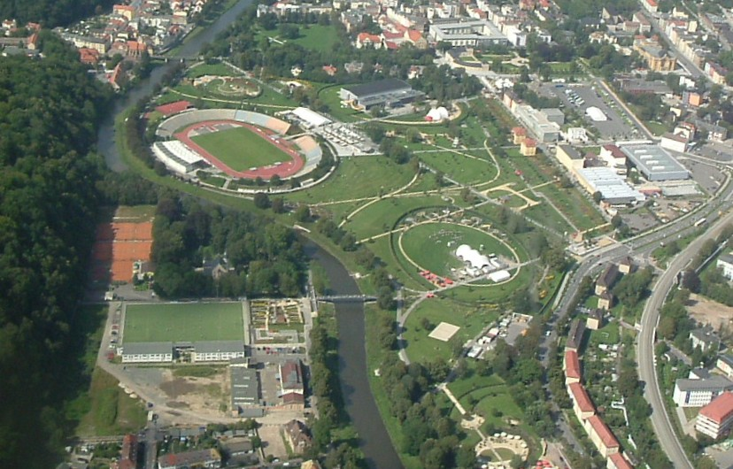 Hofwiesenpark, Gera (Luftaufnahme)